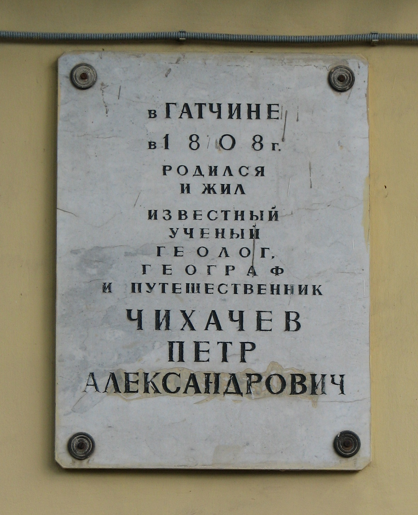 Мемориальная доска, посвящённая учёному, геологу, географу и путешественнику Петру Александровичу Чихачёву. Проспект 25 Октября, д. 19, Гатчина